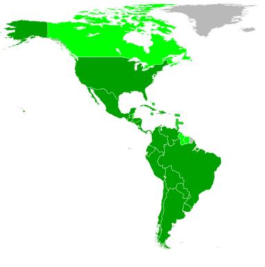 Miembros de la OEA